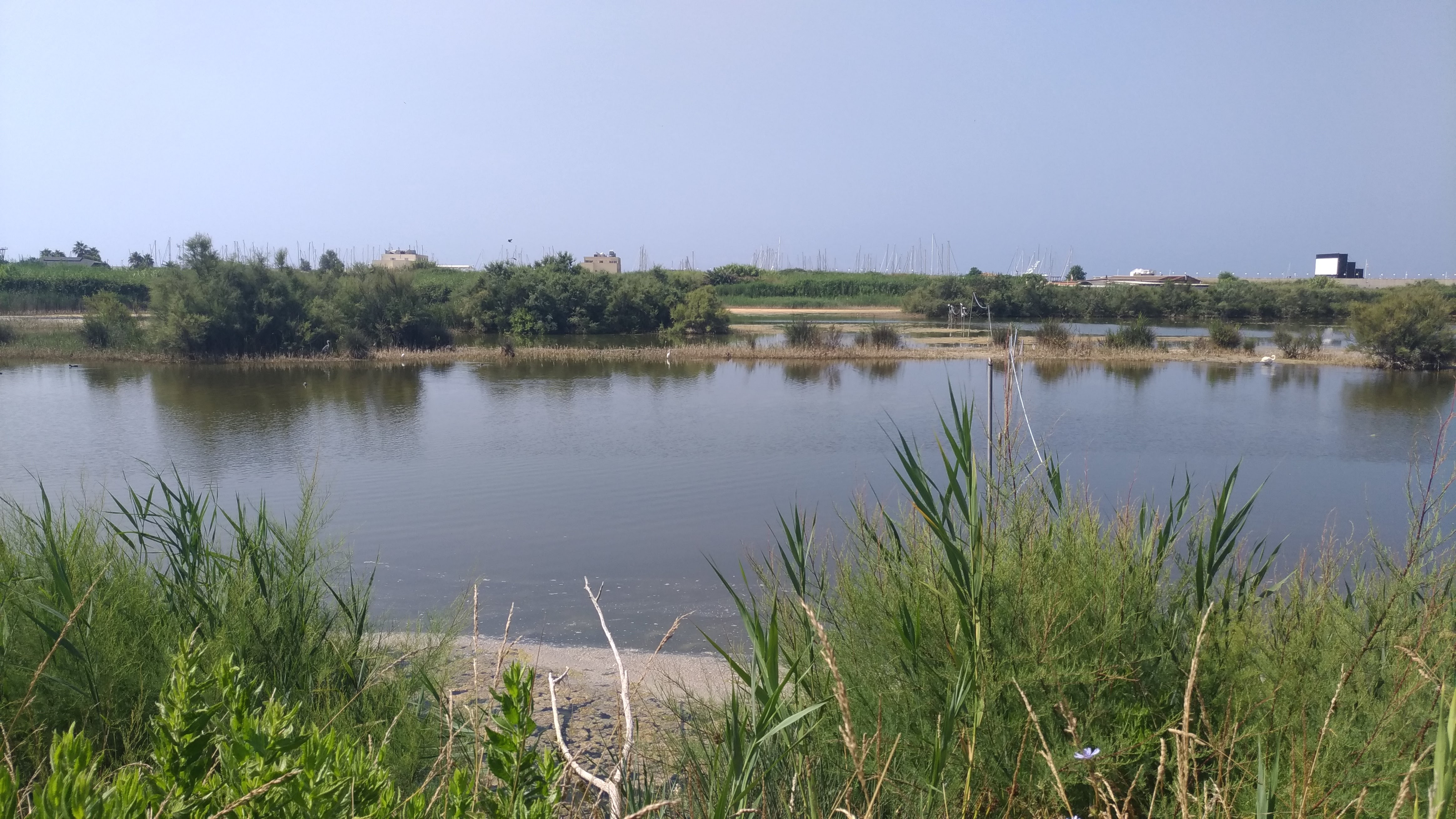 Lo stagno artificiale del Centro Habitat Mediterraneo visto dal 1° capanno fotografico.